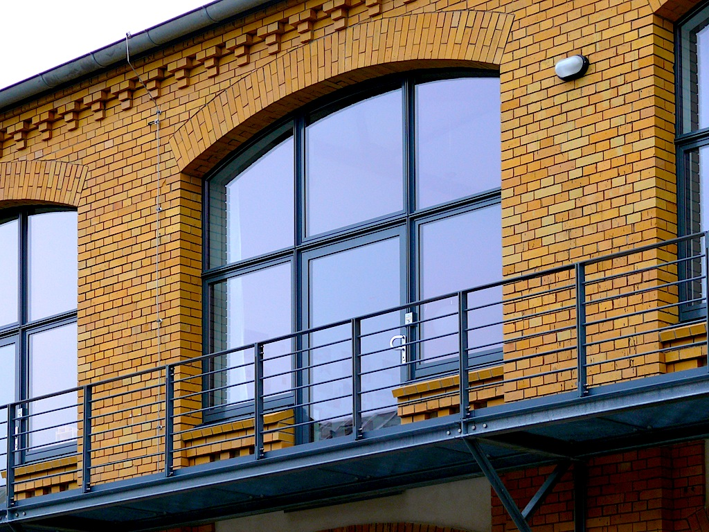 Obergeschoss des Atelierhaus79